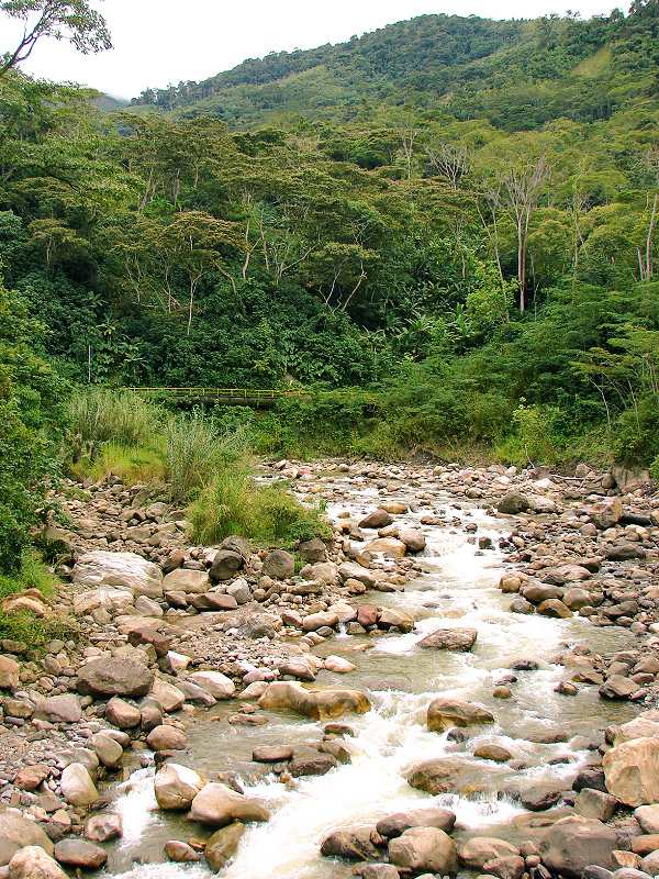 Río Quinimarí, ubicado en el Estado Táchira. Fotografía tomada cerca de la población de Río Chiquito, algunos kilometros cerca de su naciente.